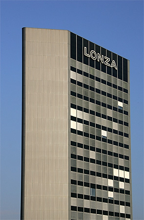 Lonza-Hochhaus in Basel